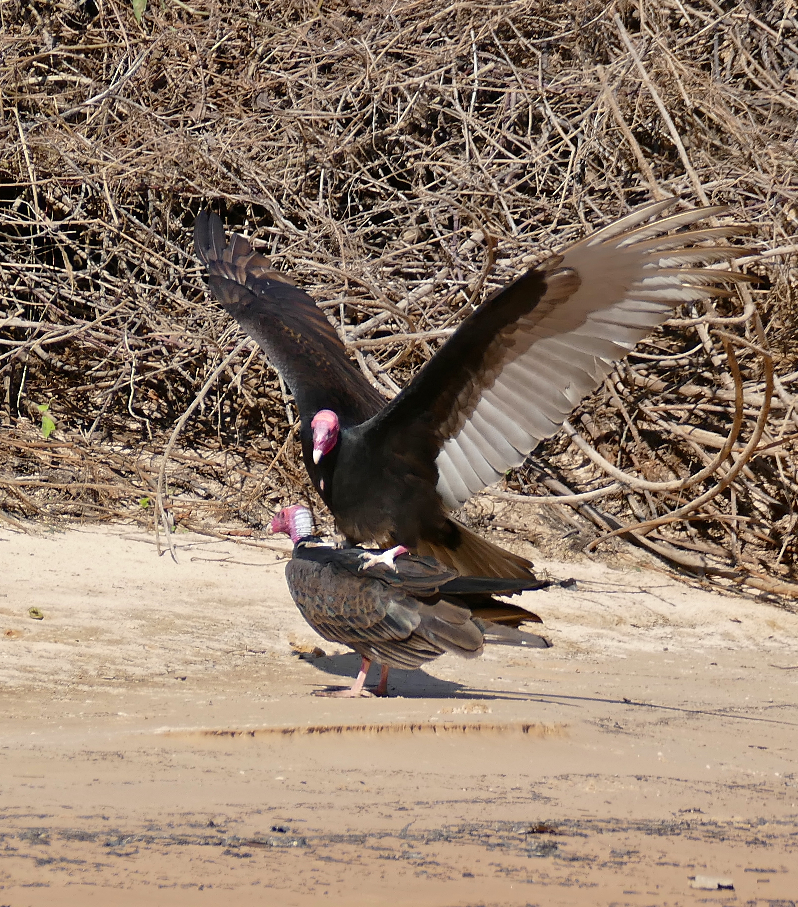 Piquiri River, Porto Jofre area, Pantanal, Poconé, Mato Grosso, BRAZIL